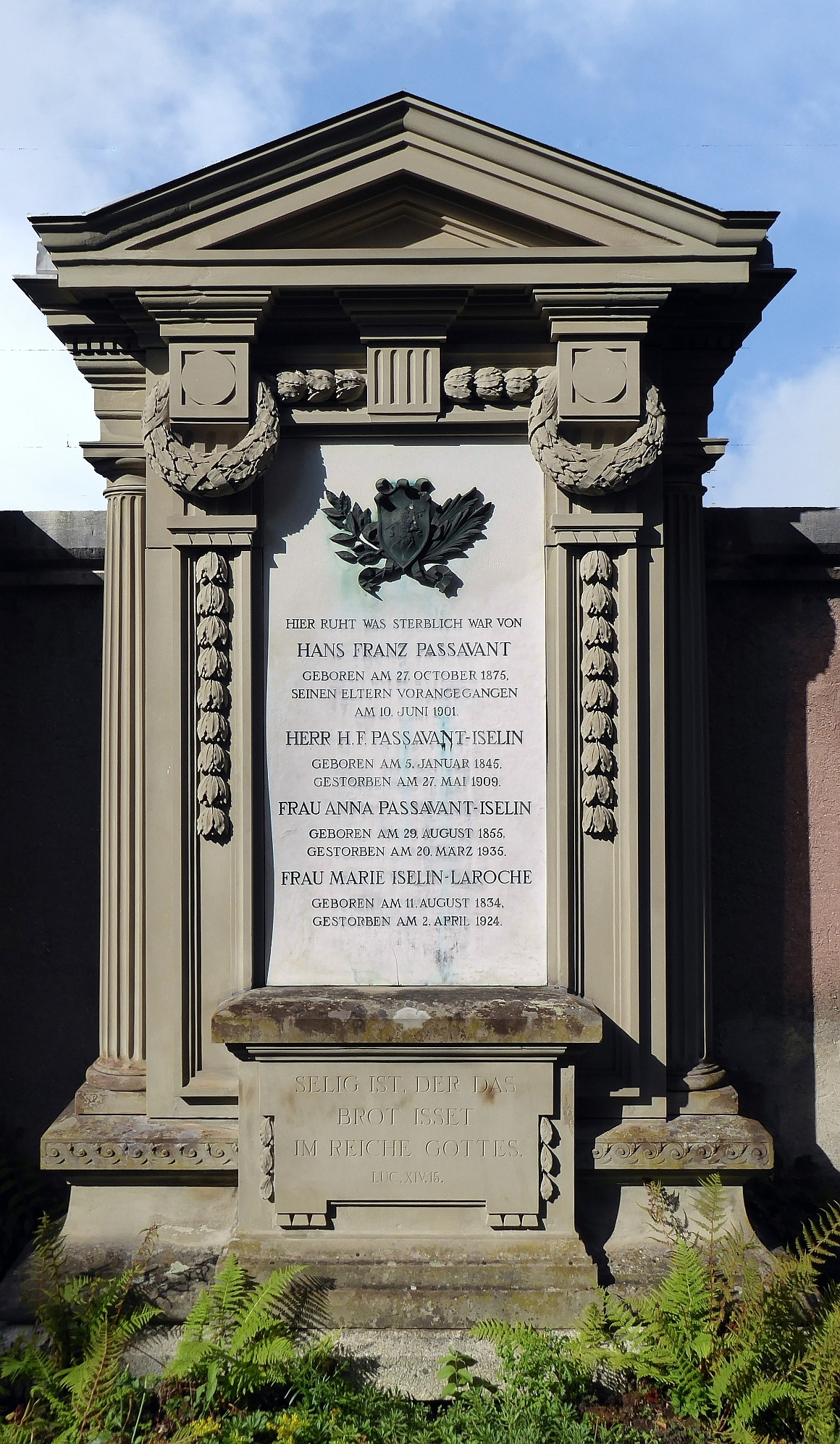 Hans Franz Passavant (Unternehmer) Friedhof Wolfgottesacker, Basel